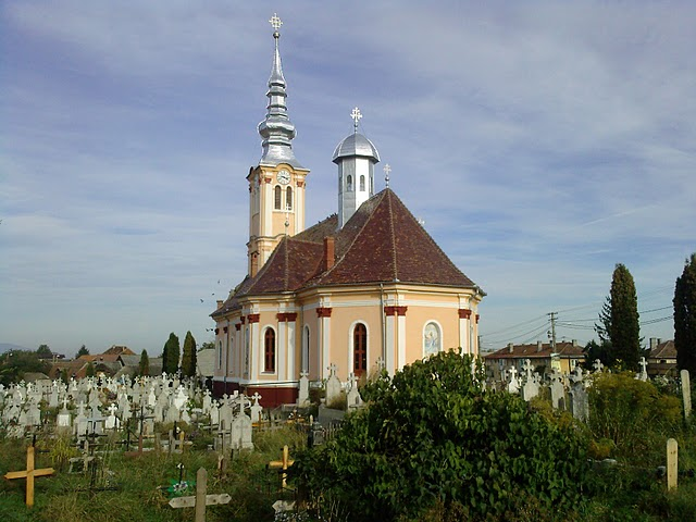 Biserica "Sfânta Adormire a Maicii Domnului", Săcele, Braşov